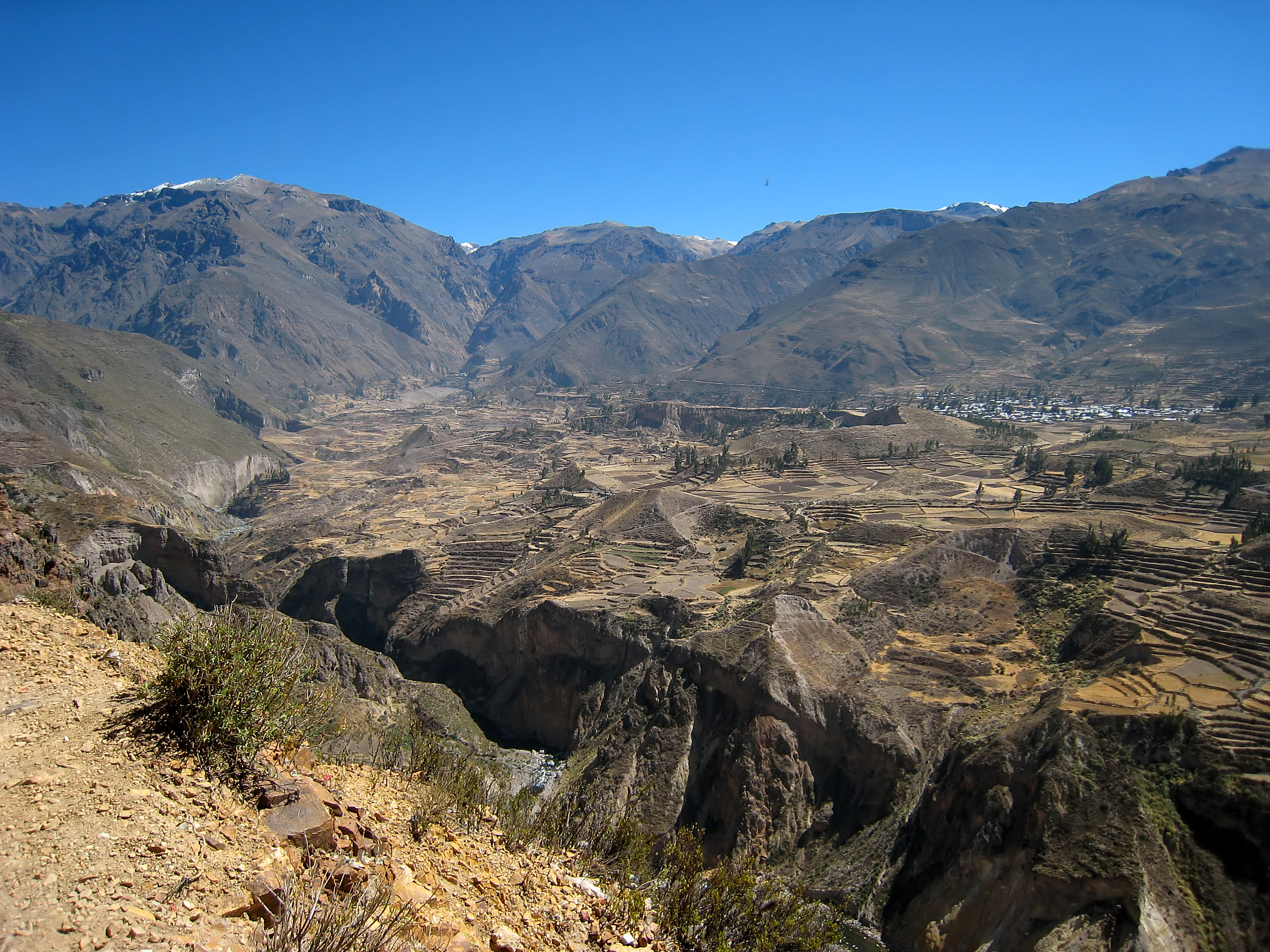 Terassen am Colca Canyon in Peru